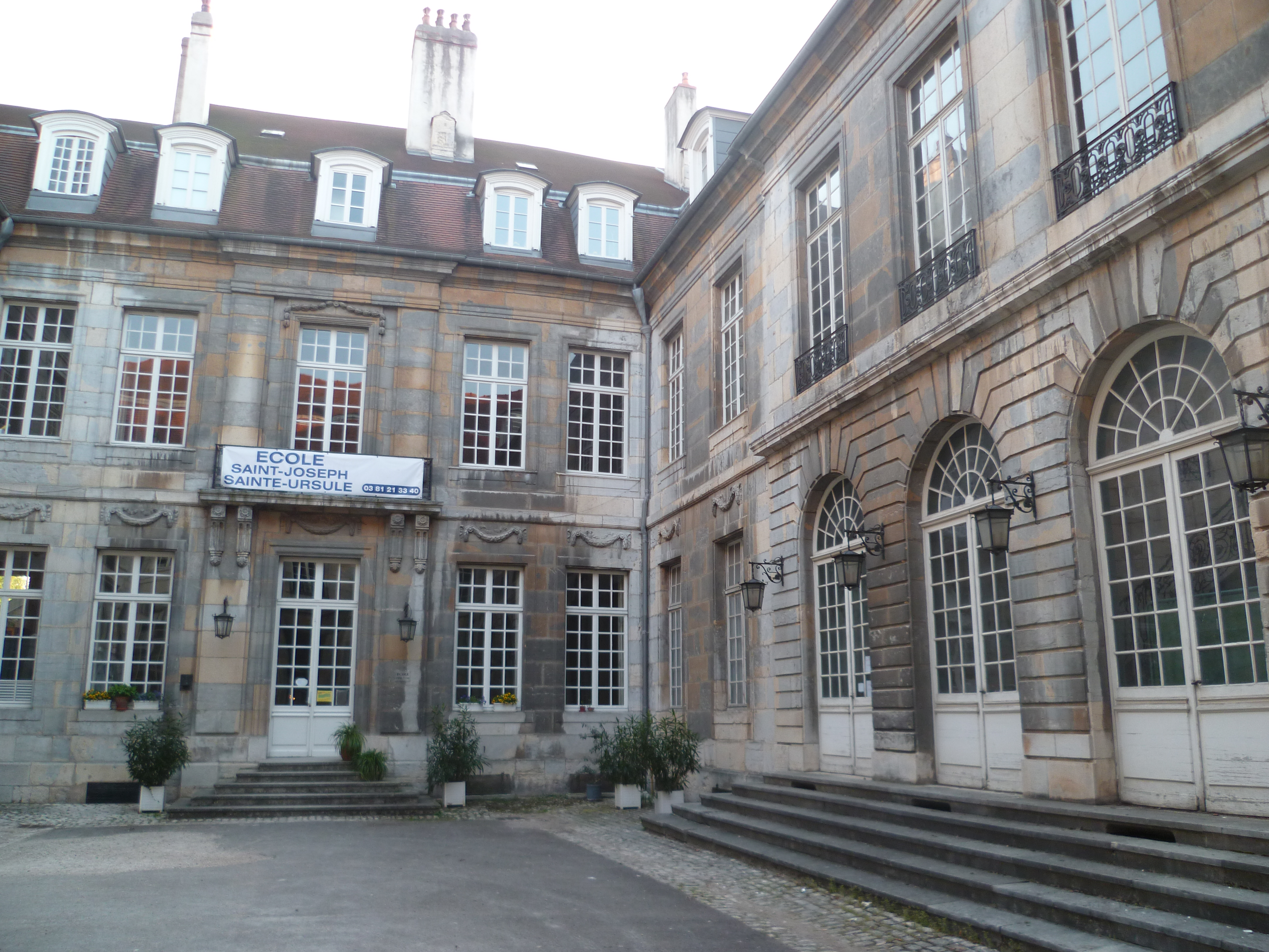 cour de l'hôtel Terrier-Santan; 68 Grande Rue, Besançon